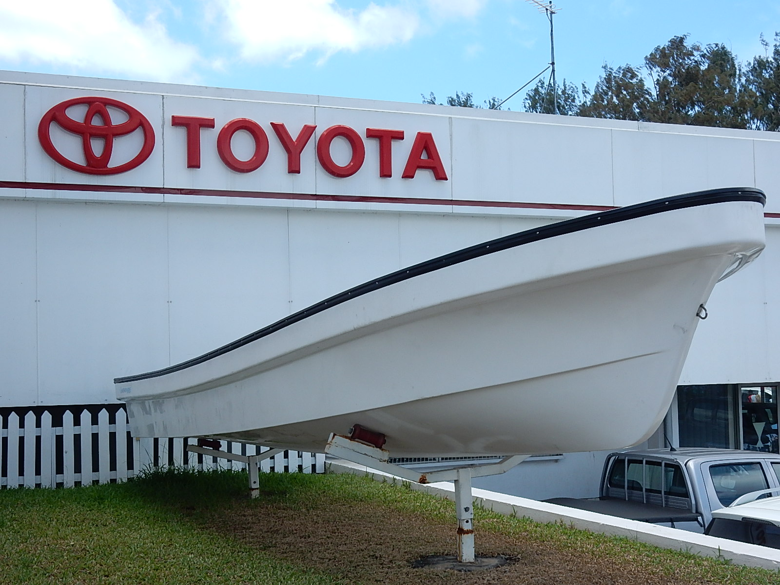 Toyota Boat